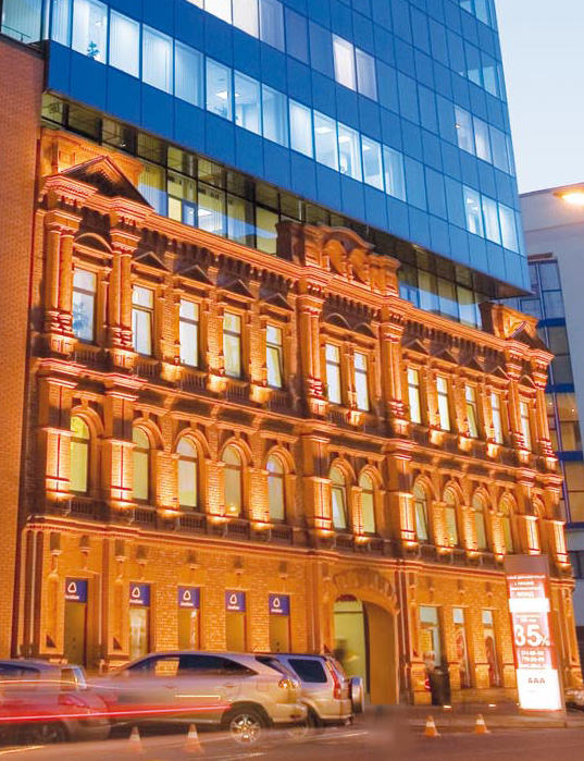 Головний офіс колишнього ПАТ "АКТАБАНК" за аресою вулиця Глінки, 7, Дніпро